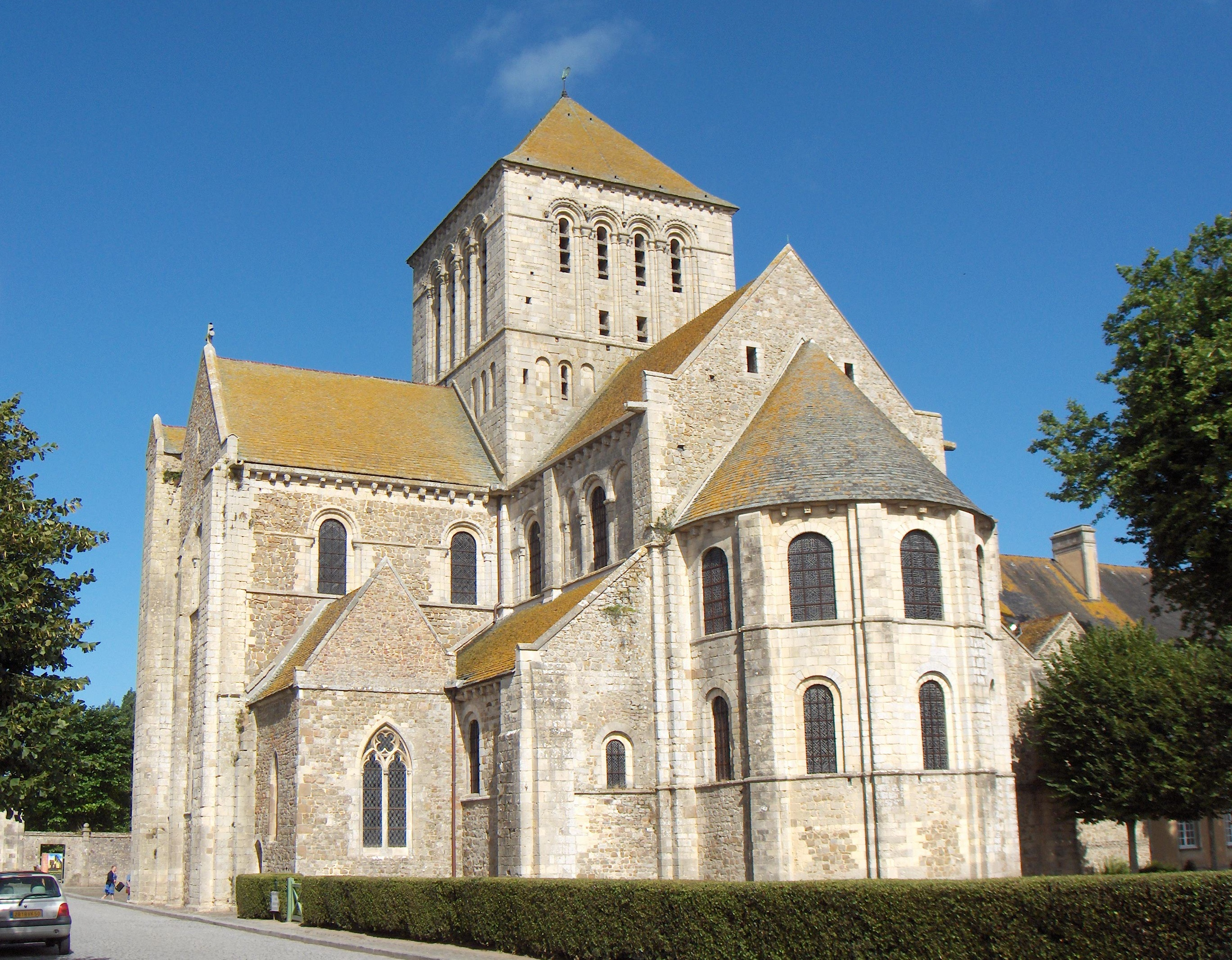 Lessay (France, dép. Manche), église de l'abbaye Sainte-Trinité (XIe siècle)